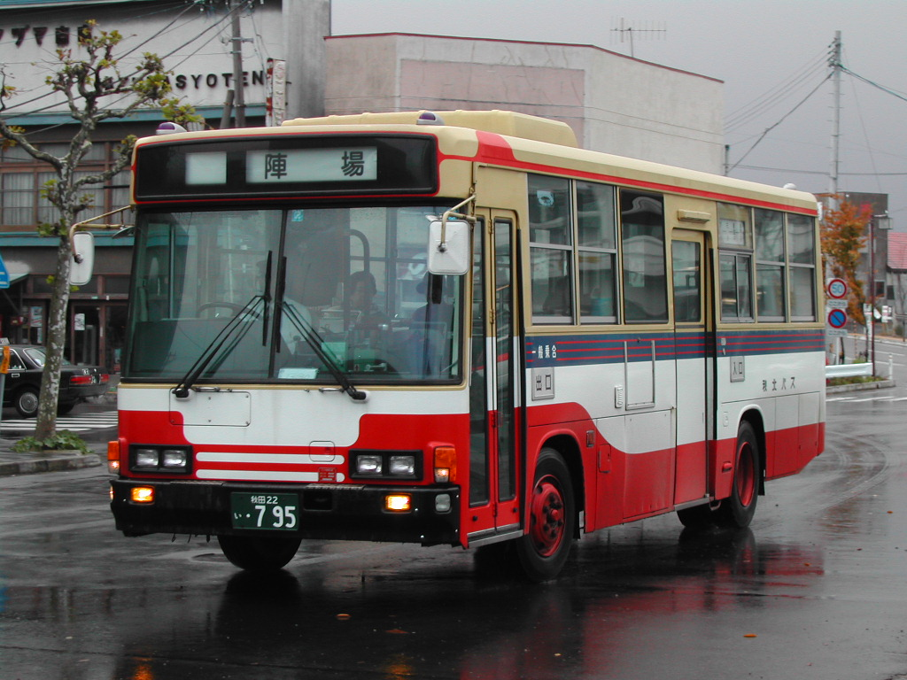 大館駅前にて撮影